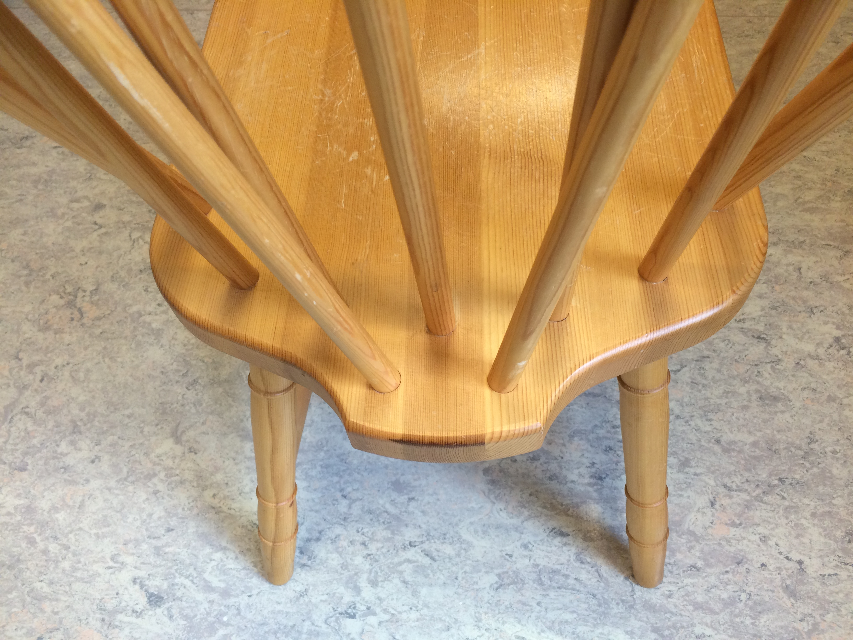 bildet viser "halsen" bak på setet, som er typisk for budalsstoler. Fra denne går to skråavstivere/spiler opp til ryggbuen.